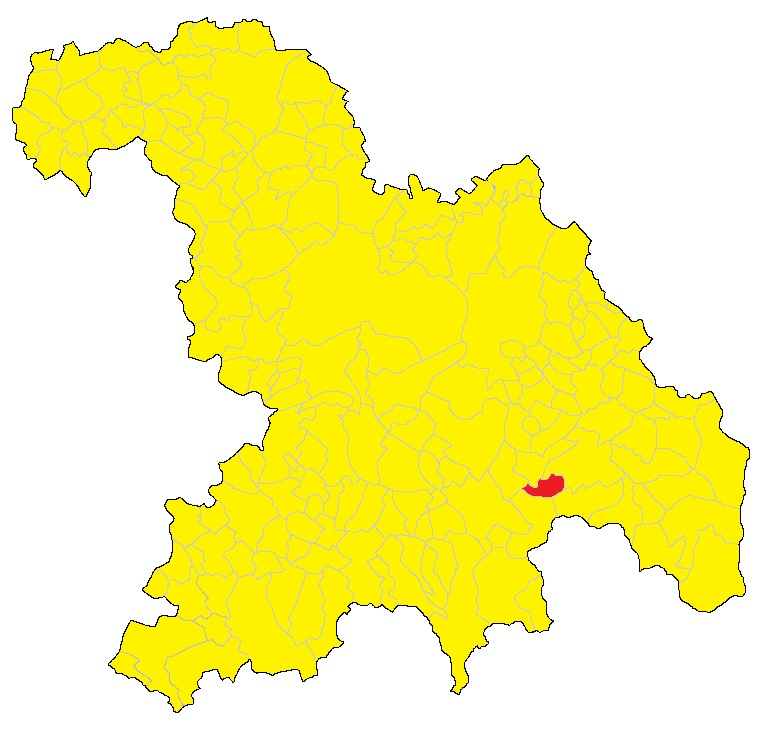 Mappa del comune di Vignole Borbera (AL)